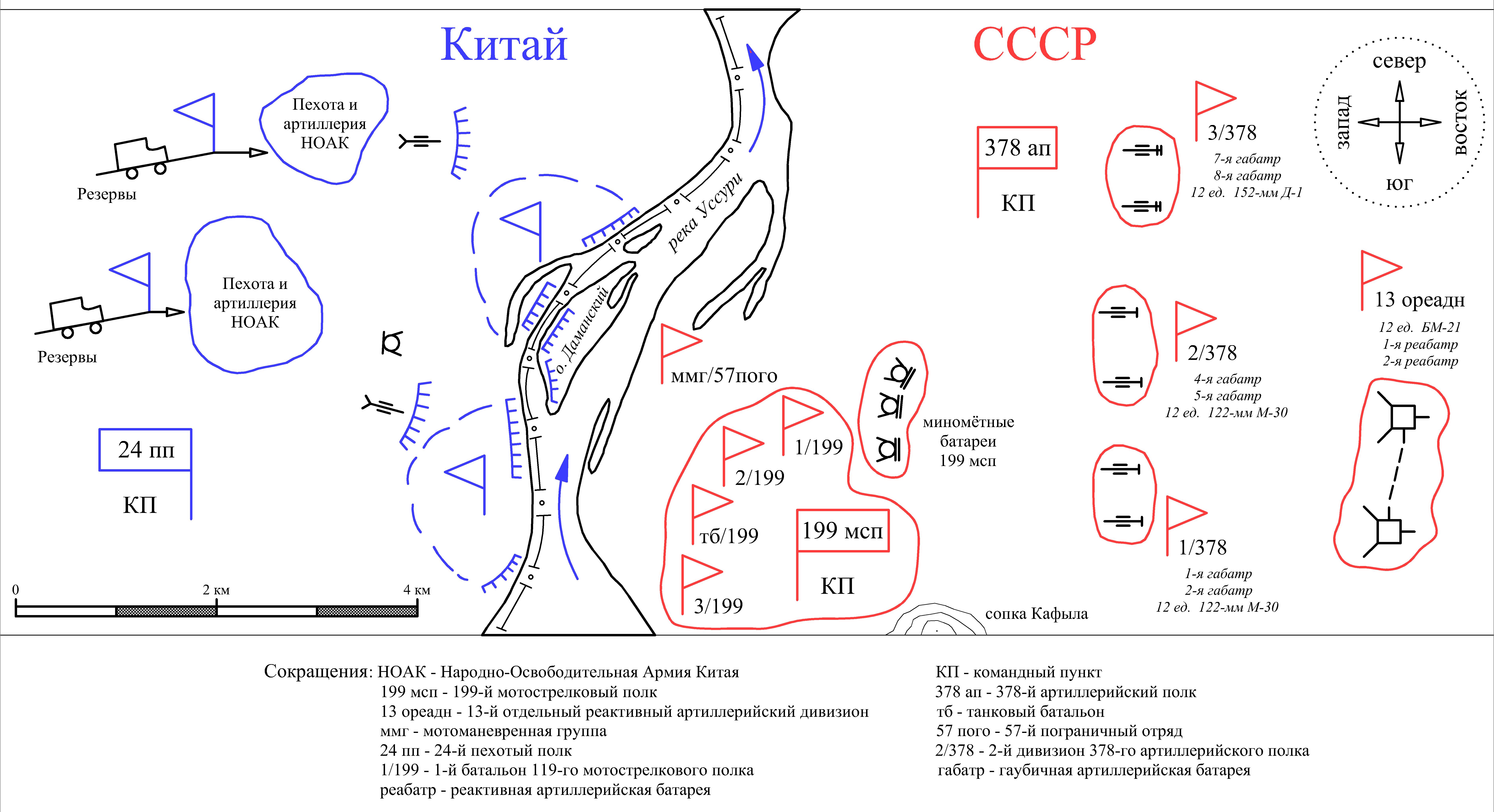 Позиции артиллерии 135-й мотострелковой дивизии у острова Даманский на 15 марта 1969 года. Репродукция схемы из статьи Рябушкин Д.С., Павлюк В.Д. «Советская артиллерия в боях за остров Даманский»